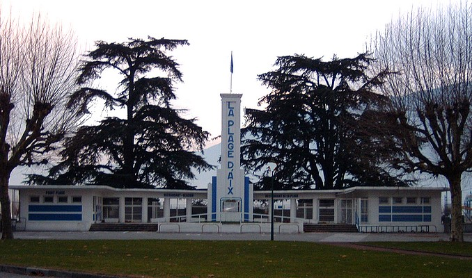 Entrée de la plage publique de la ville d'Aix-les-Bains en France dans le département de la Savoie. Ce batiment est de style art déco.